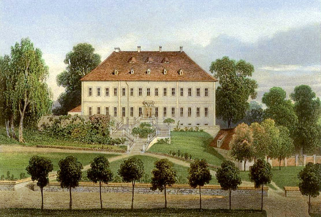 Schloss Heidersdorf, Lithografie aus dem 19. Jahrhundert